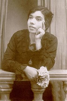 Imagen Pastora Pavón (1890-1969) conocida artísticamente como la "Niña de los peines"